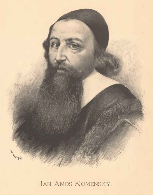 Portréty předních osobností od Jana Vilímka